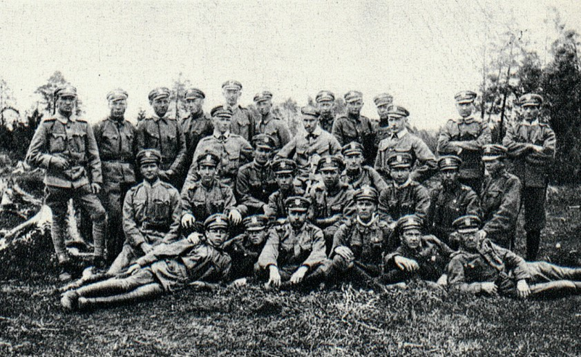 Pluton ppor. Jarosława Szafrana z 1 pułku piechoty Legionów Polskich.